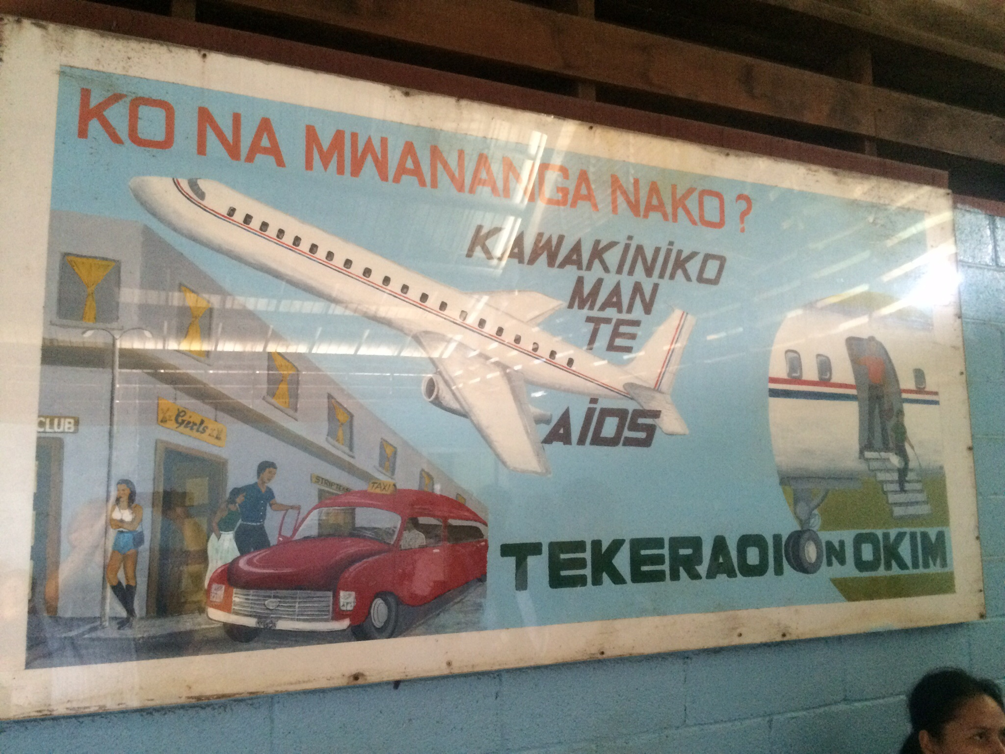 Salle d'attente des départs